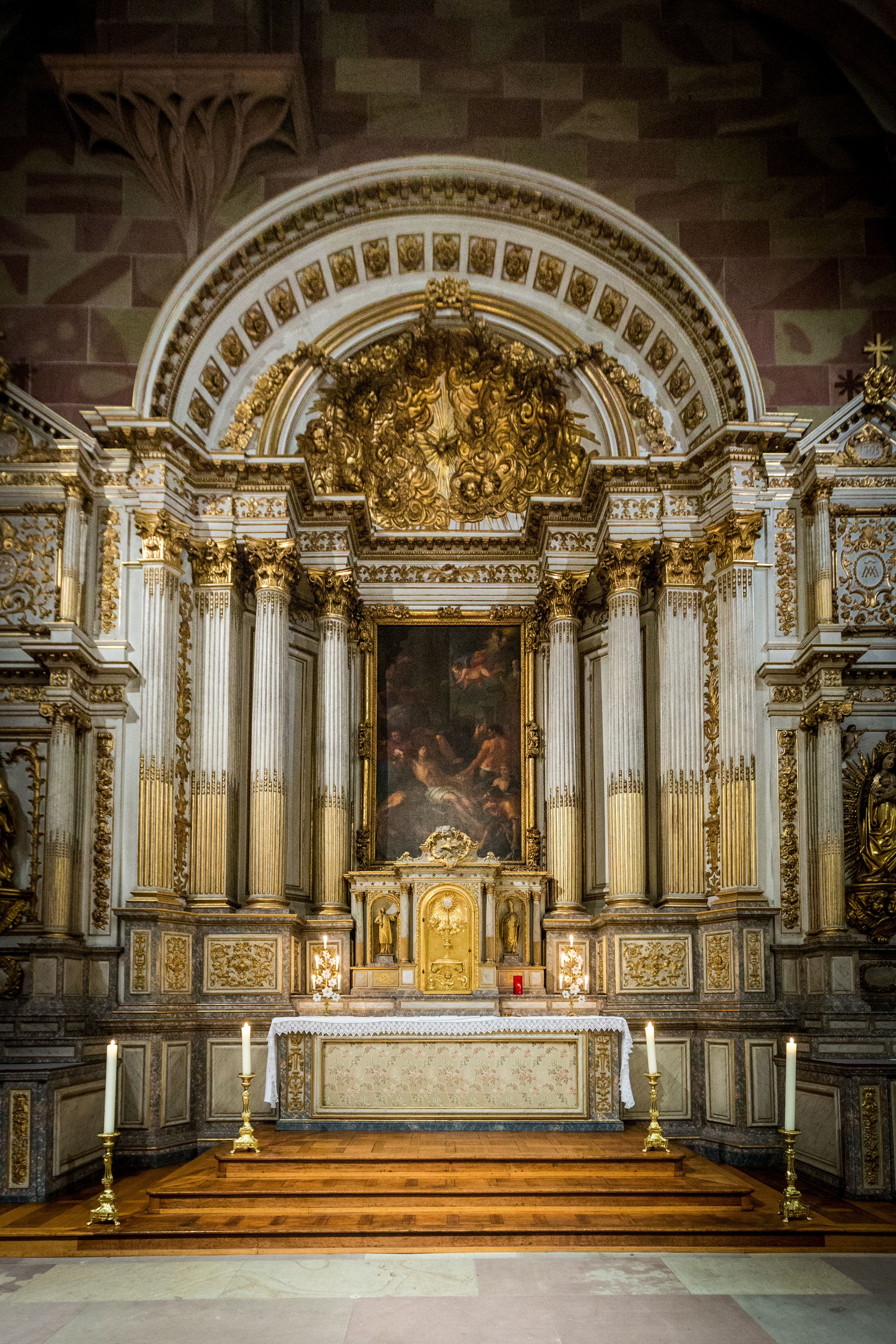 Cathédrale Notre-Dame de Strasbourg chapelle Saint-Laurent avril 2014.